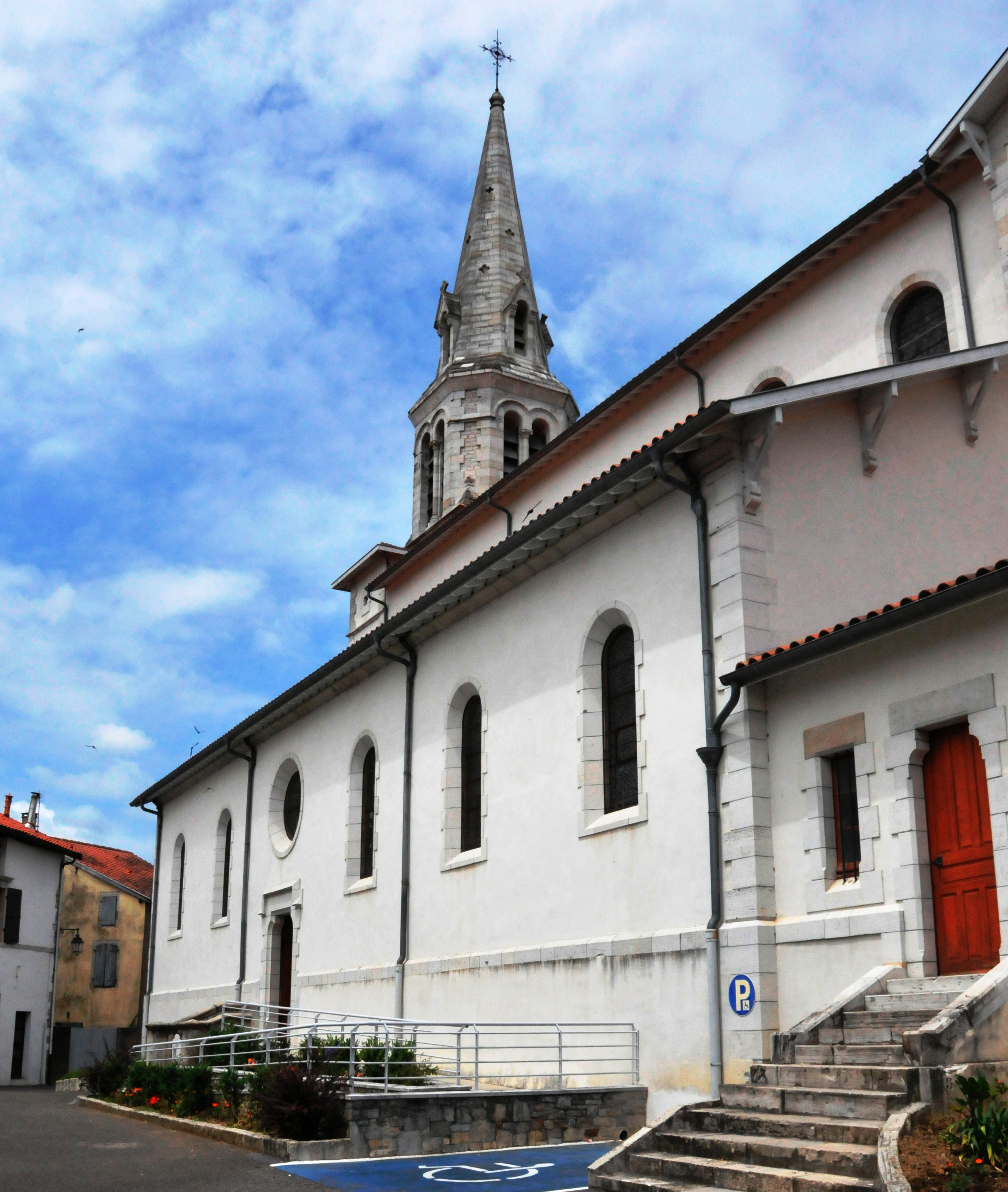 Kirche in Bidache